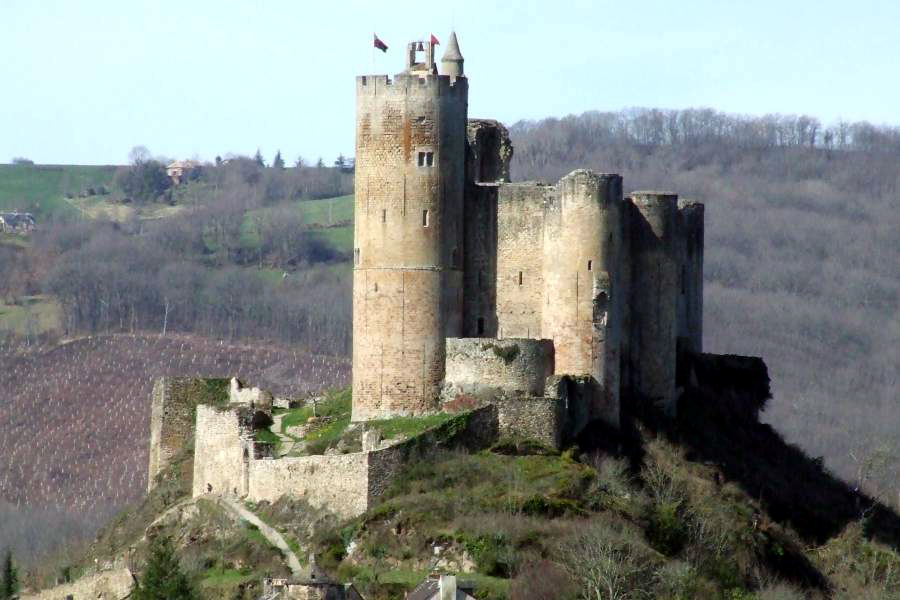 Château de cue eric (12)